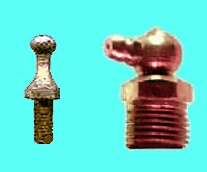 Foto de alemite curvo - Tomada con cámara digital Kodak, por J. Richino.